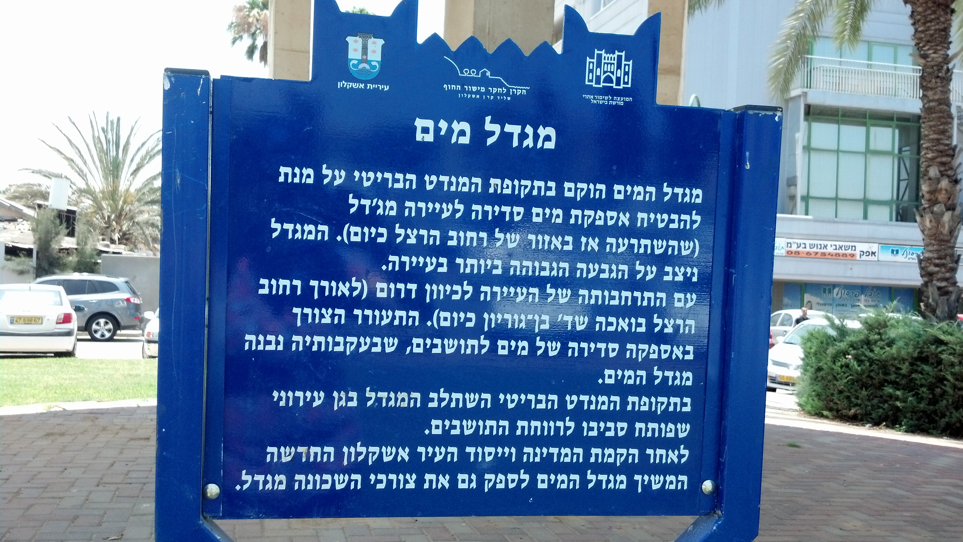 Ashkelon water tower